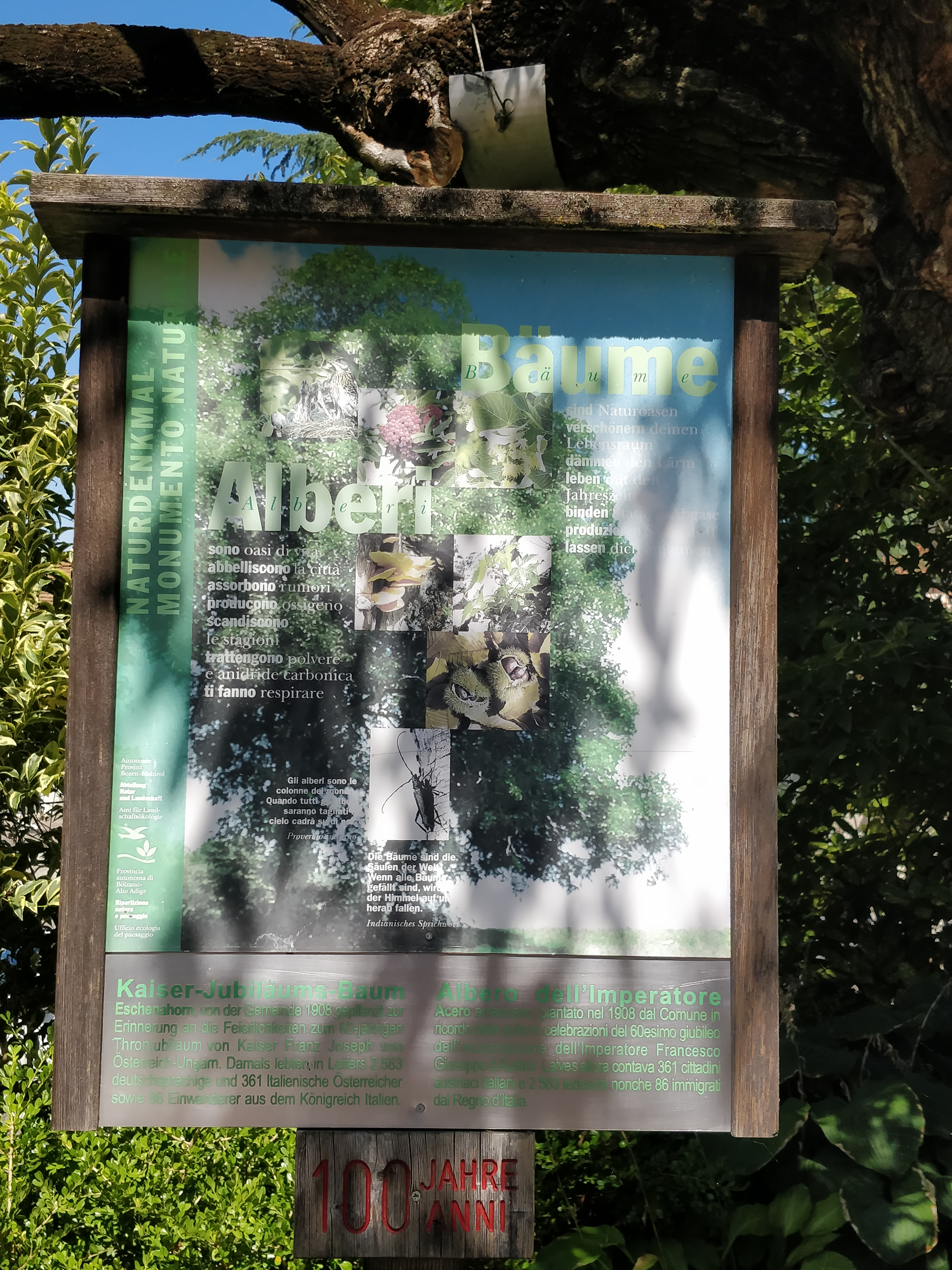 Tabella esplicativa dell'acero americano sito di fronte alla chiesa parrocchiale di Laives